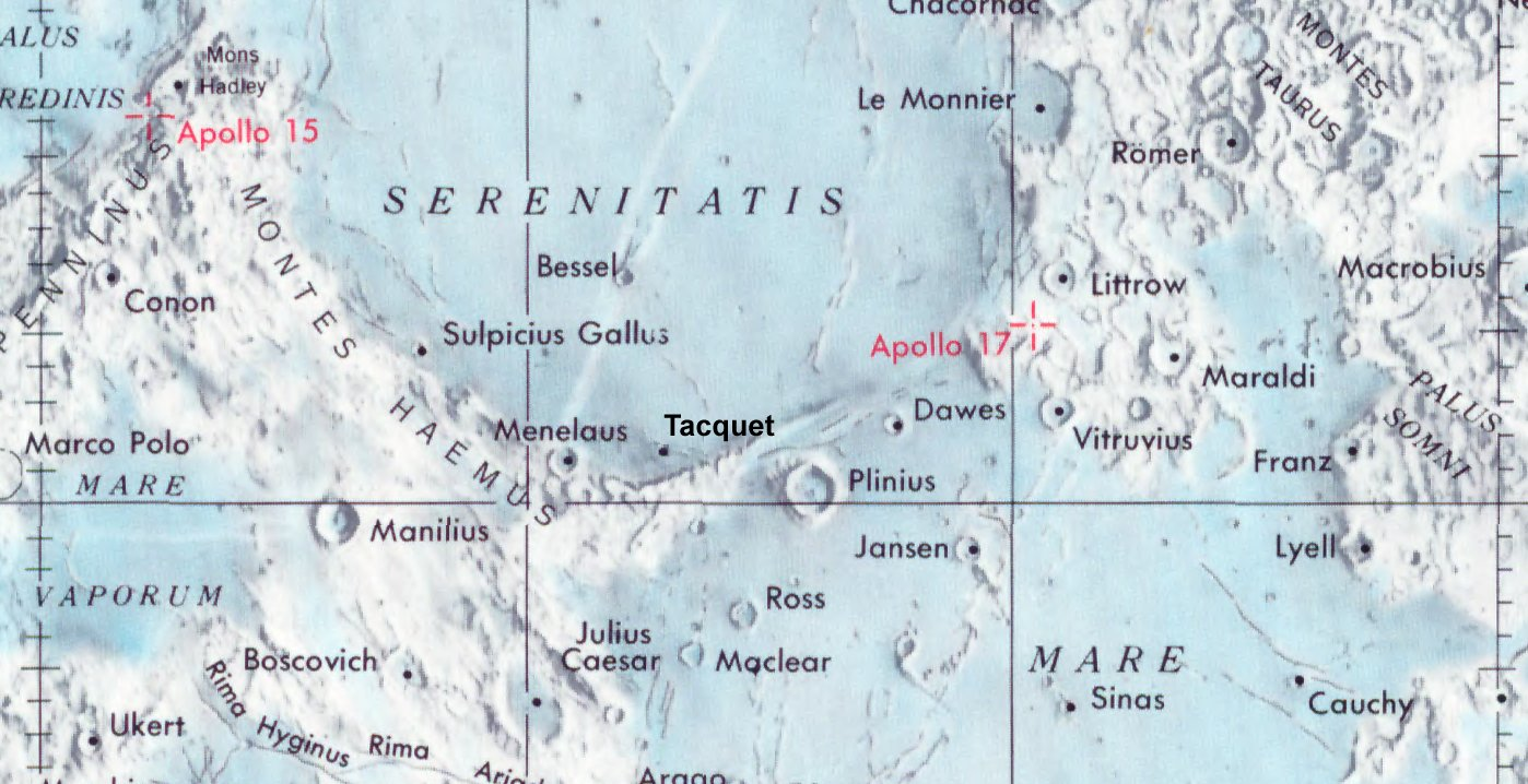 Cráter lunar Tacquet. Localización. (Lunar Chart LPC1. Second Edition)